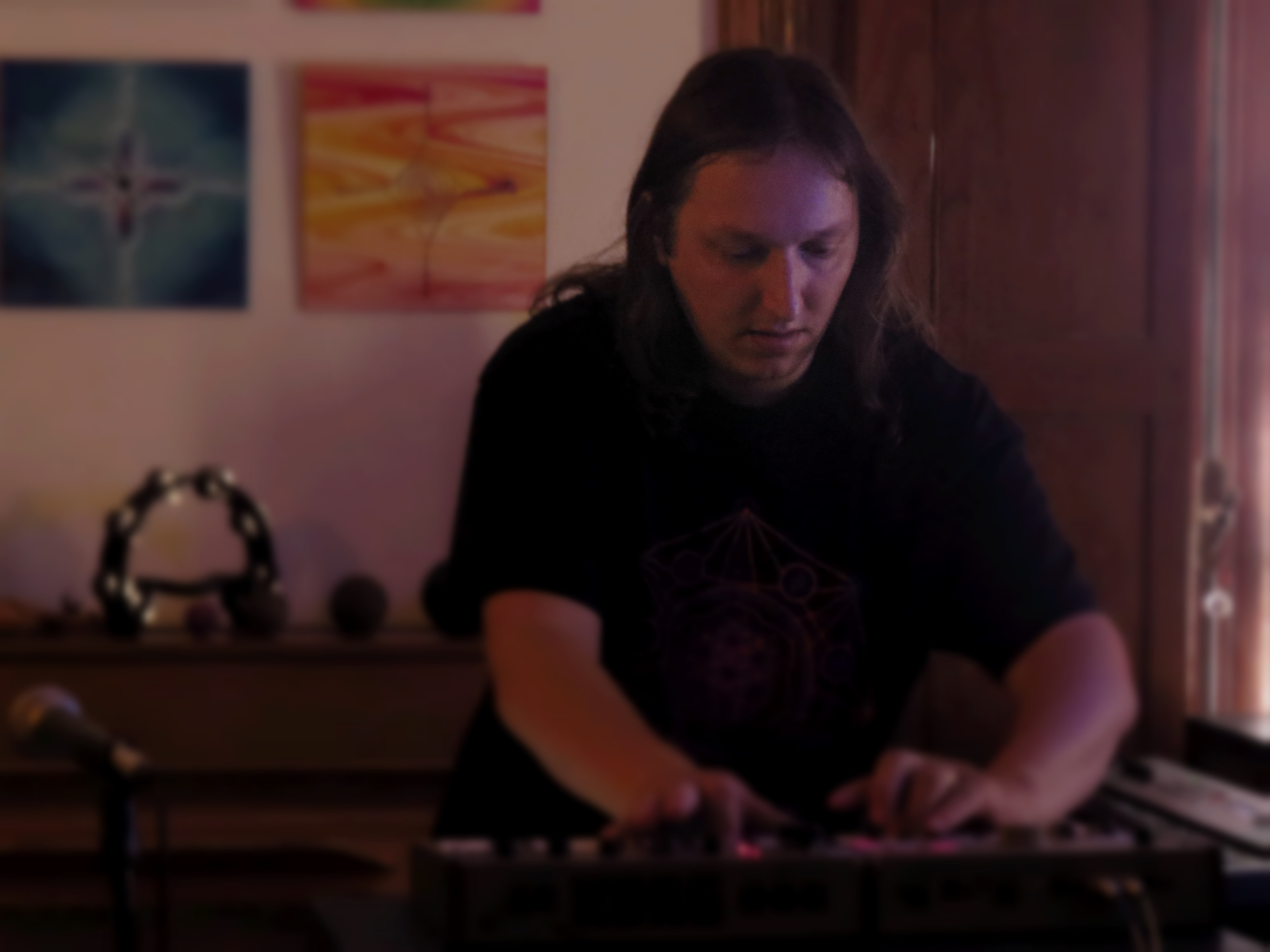 Pablo Ojeda Music